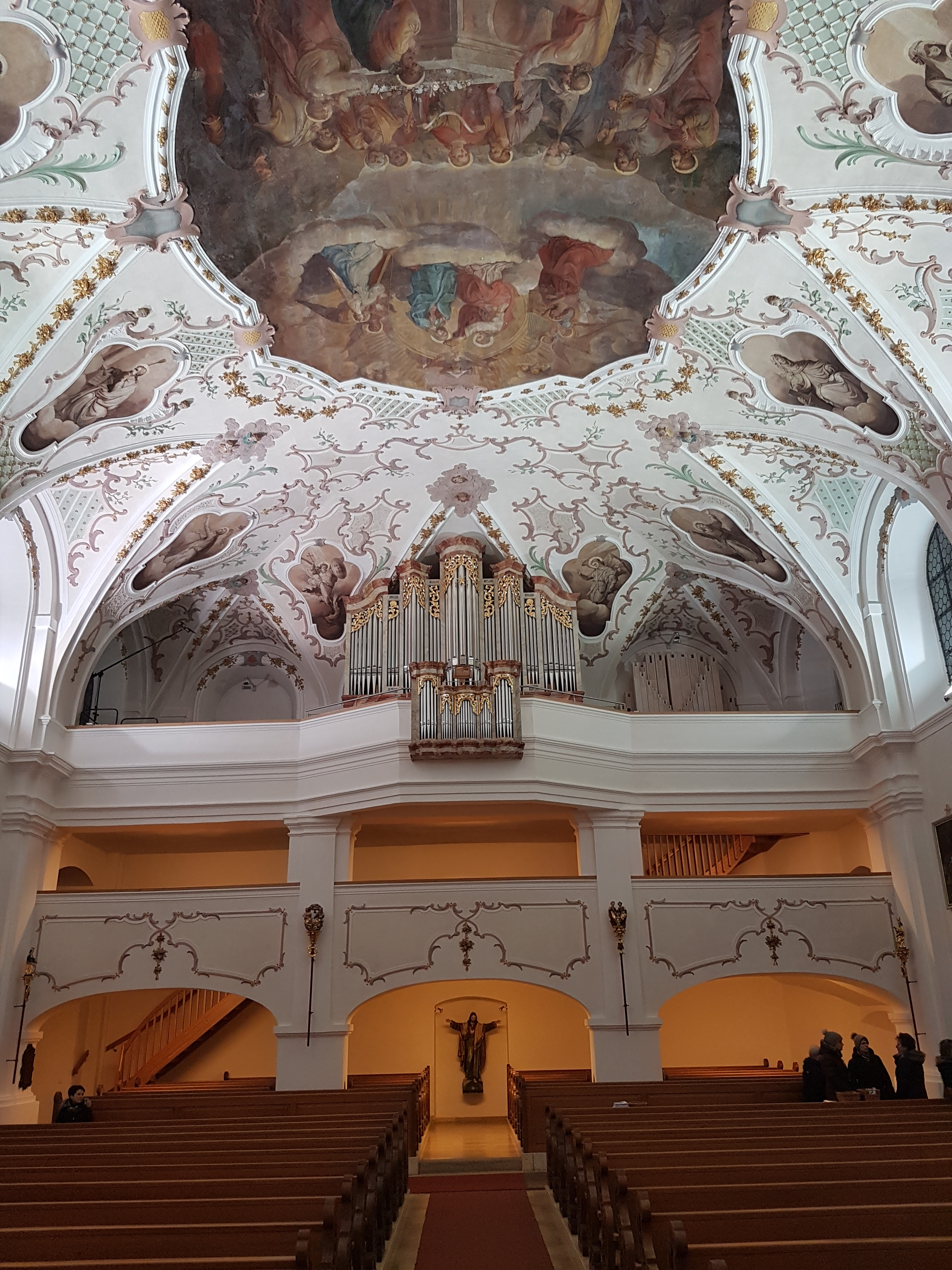 Orgel St. Georg